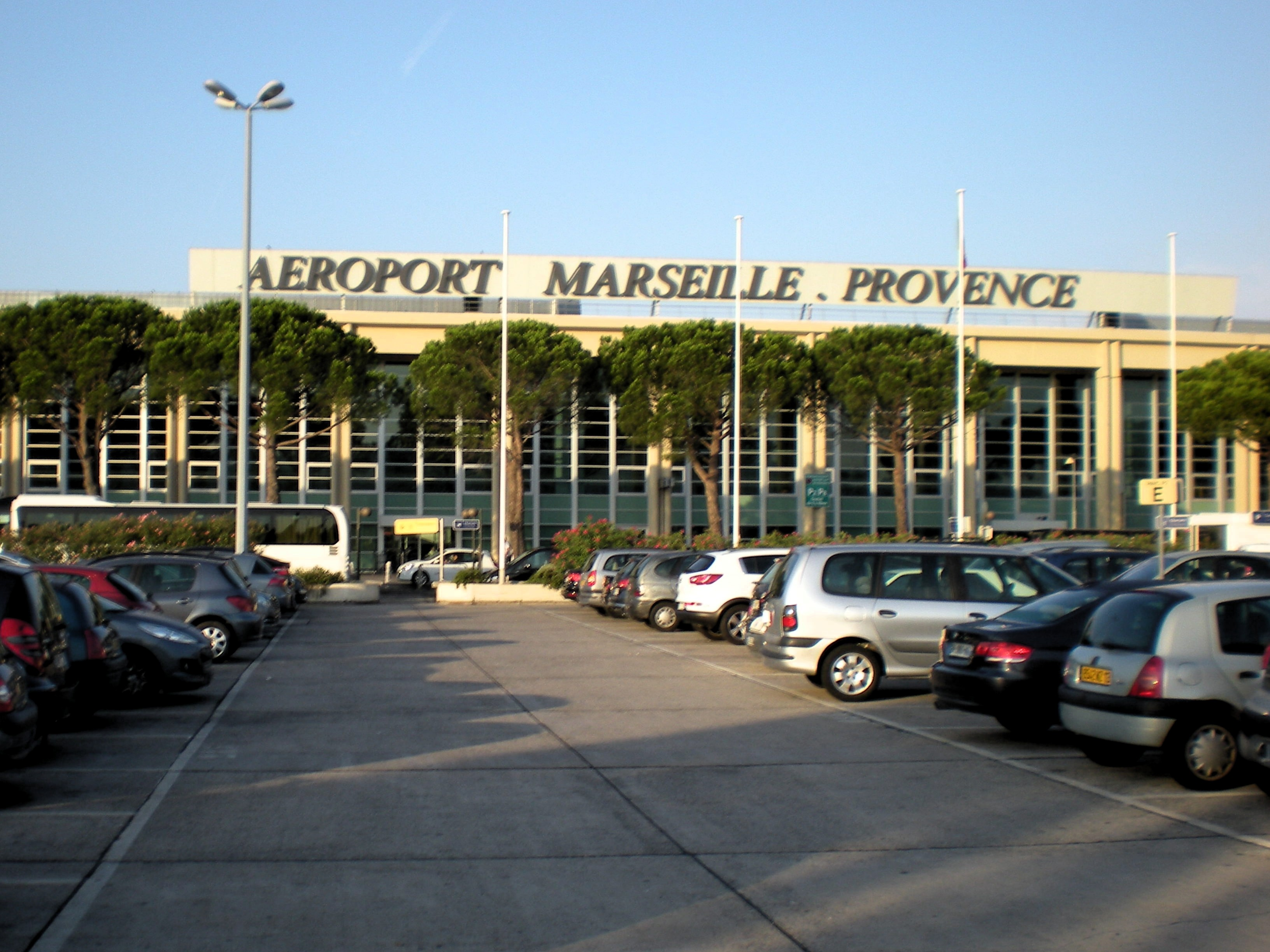 Aéroport Marseille-Provence